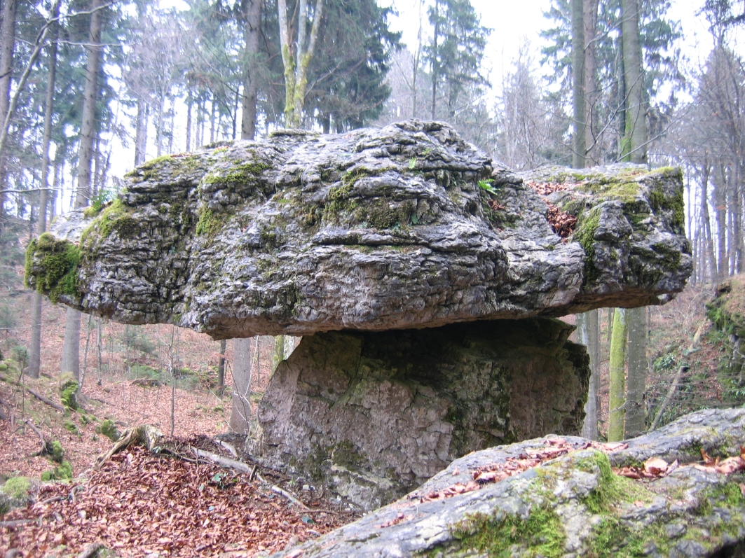 Tomaževa miza